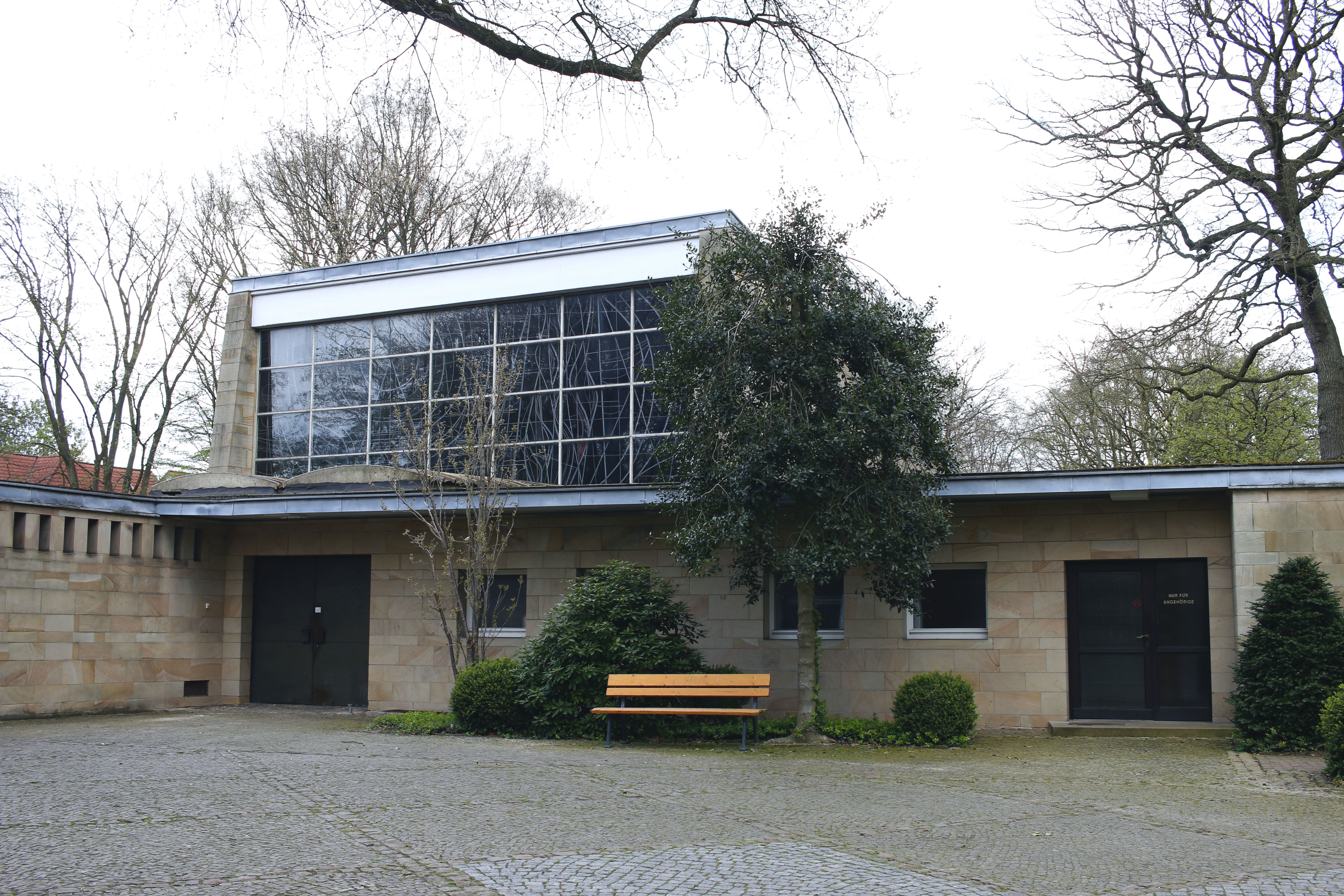 Kapelle auf dem Waller Friedhof in Bremen-Walle. (Baujahr: 1957; wurde zusammen mit dem Krematorium und der Urnenhalle nach den Plänen des Architekten Otto Bartning, Darmstadt, erstellt.)